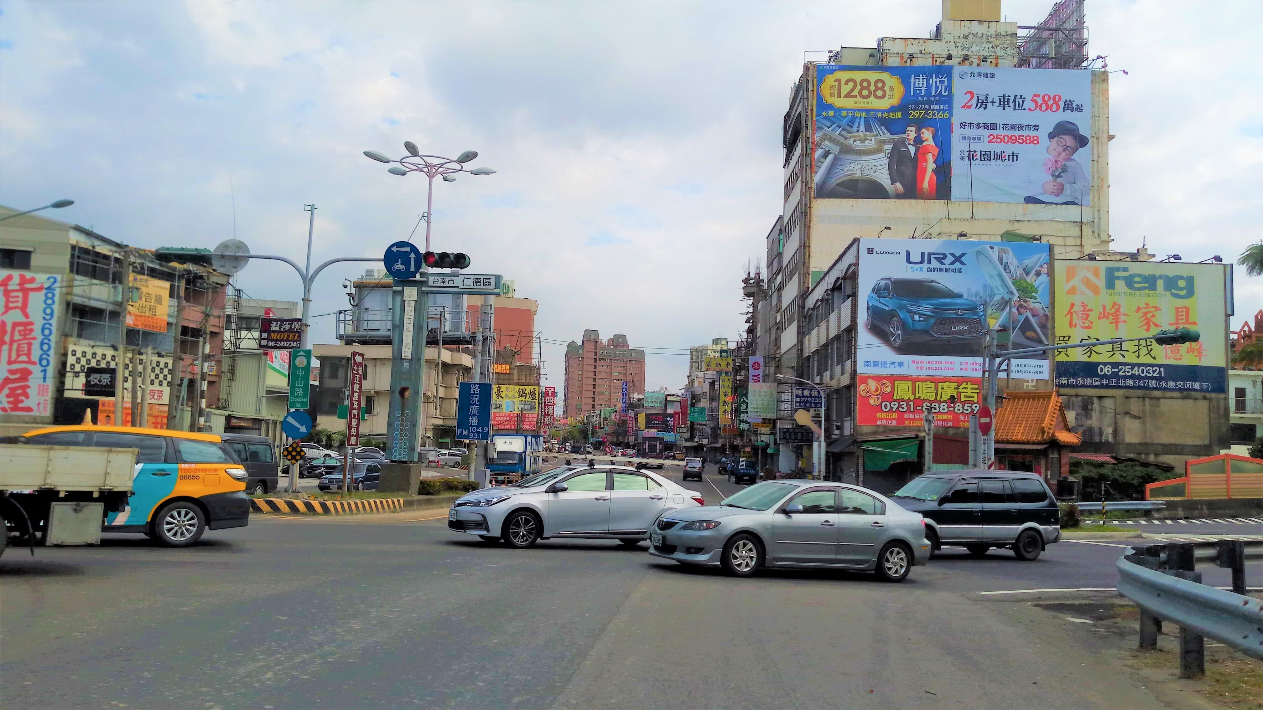 仁德交流道(北上)